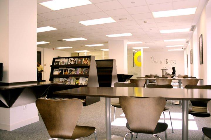 Biblioteca Videoteca2